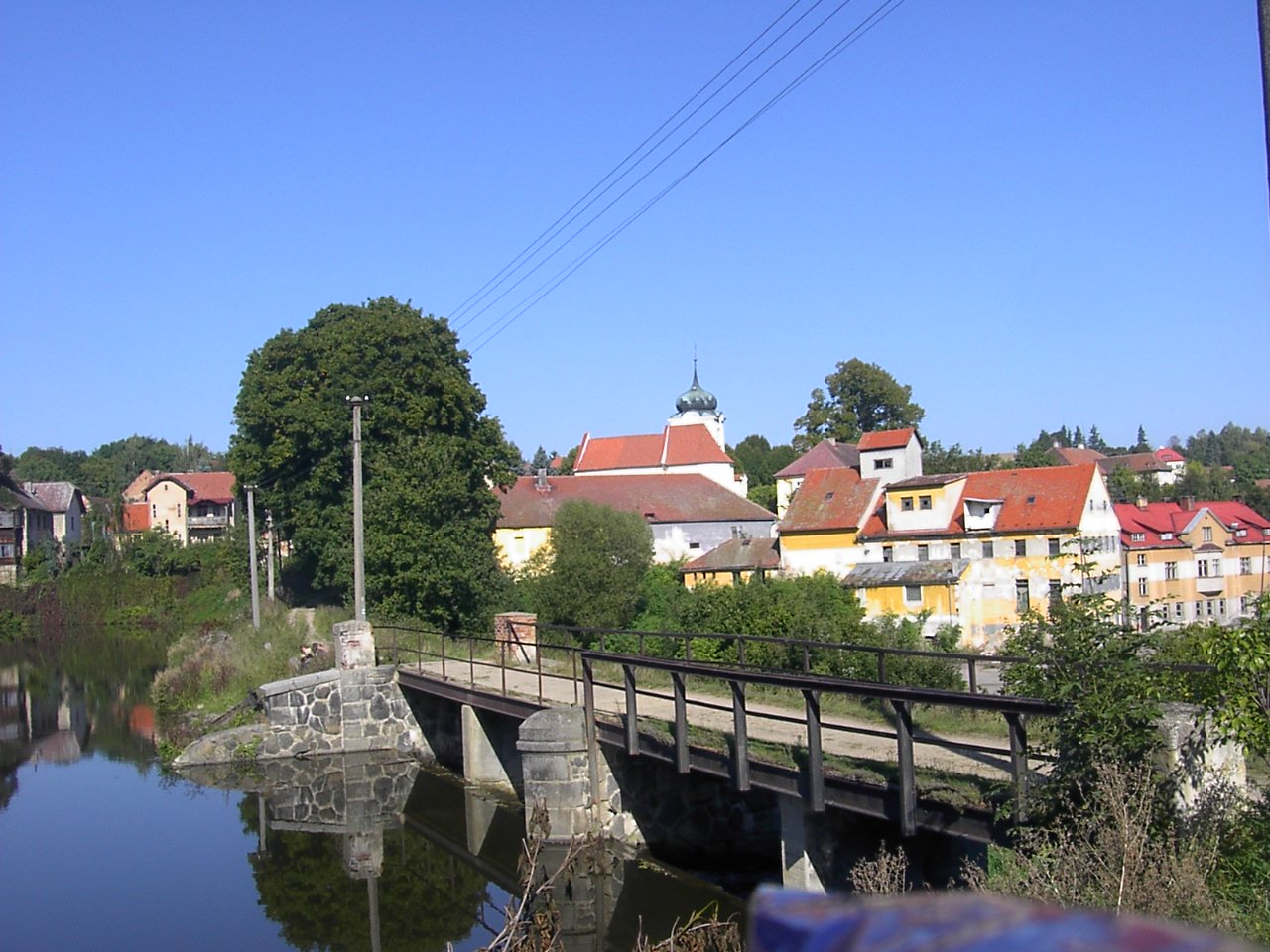 general view to Postupice